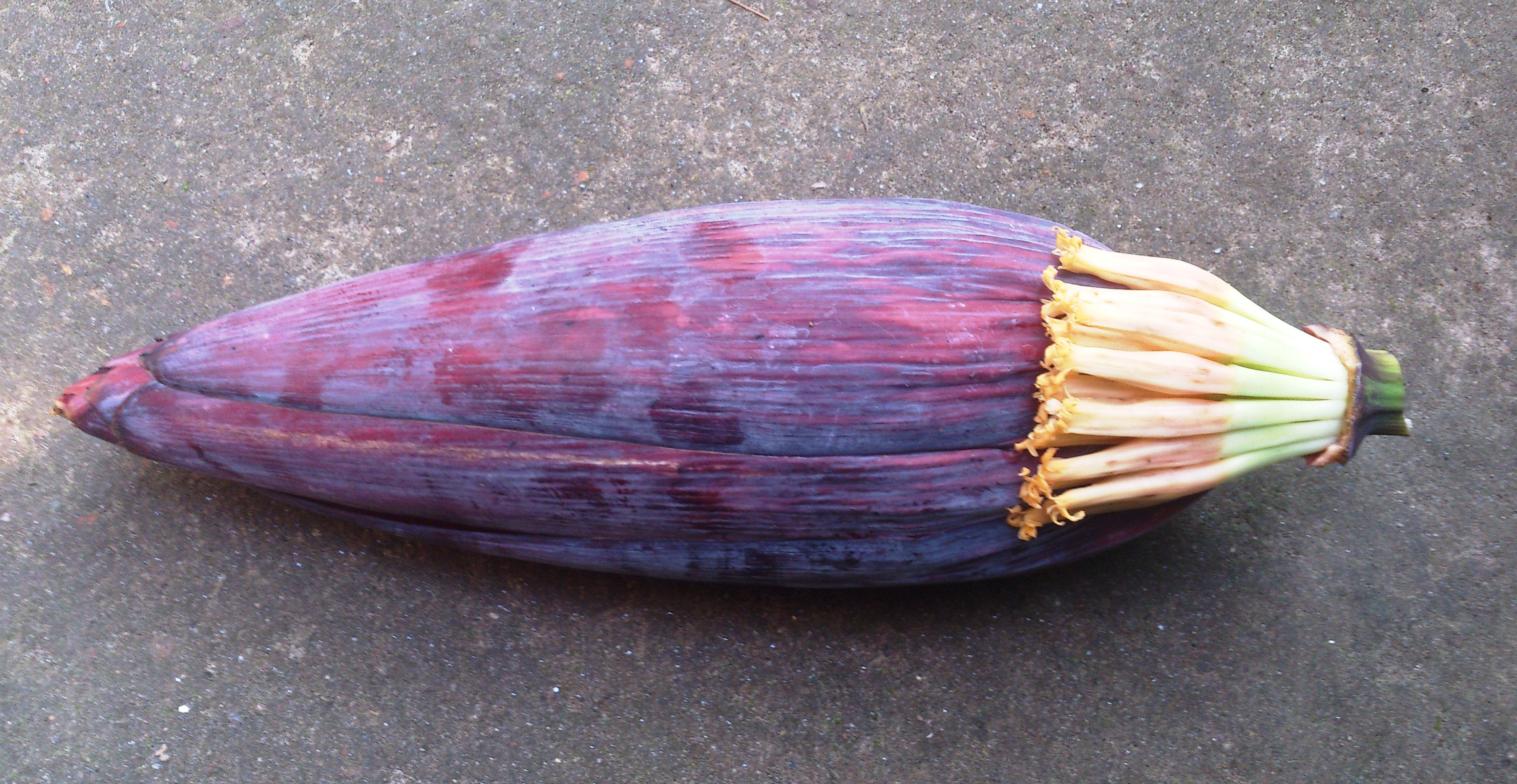 ഏത്തവാഴയുടെ കൂമ്പ്